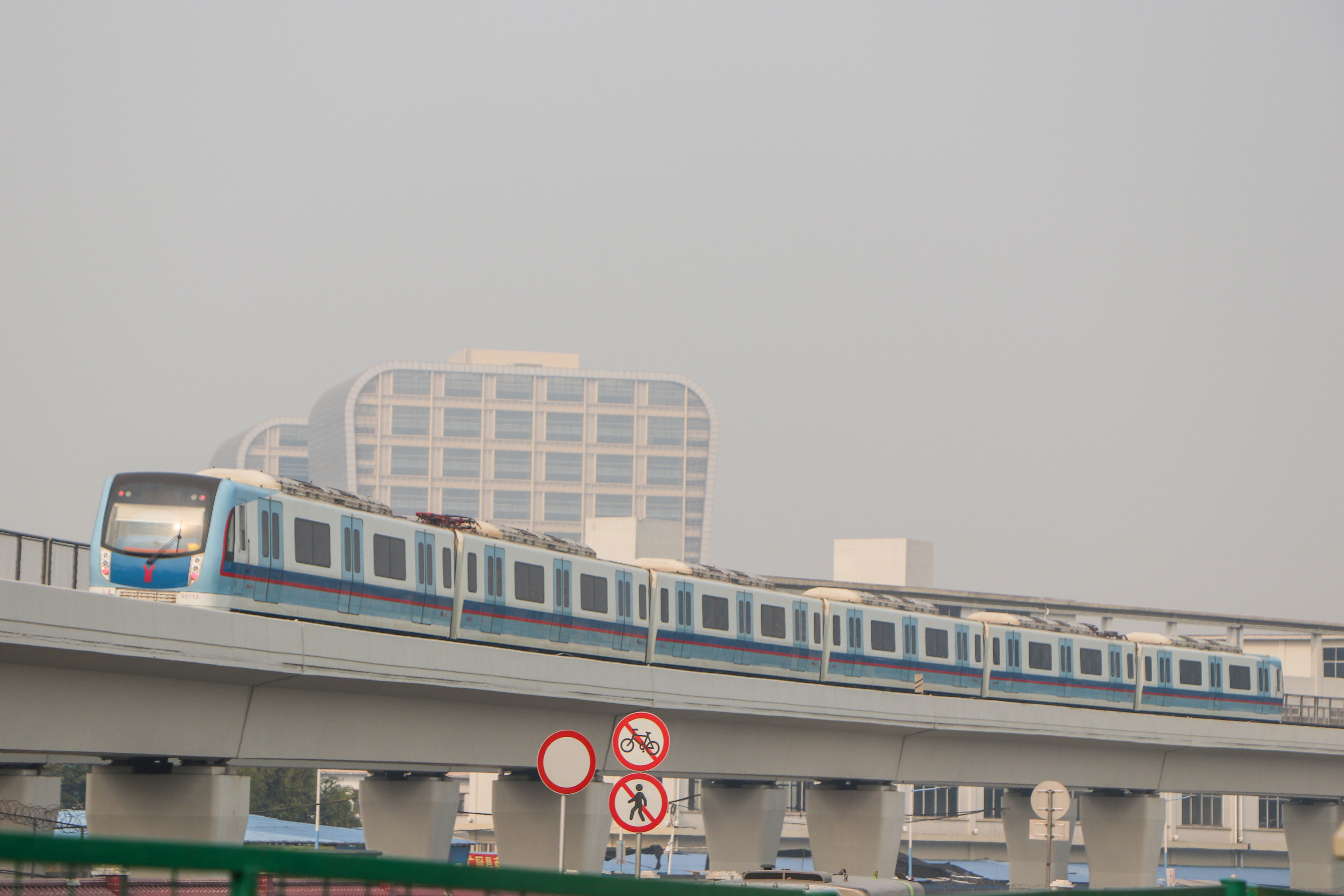 广州地铁5号线L4-II型列车（113114）即将到达坦尾站